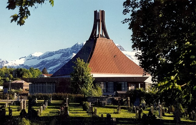 Sykkulven kirke